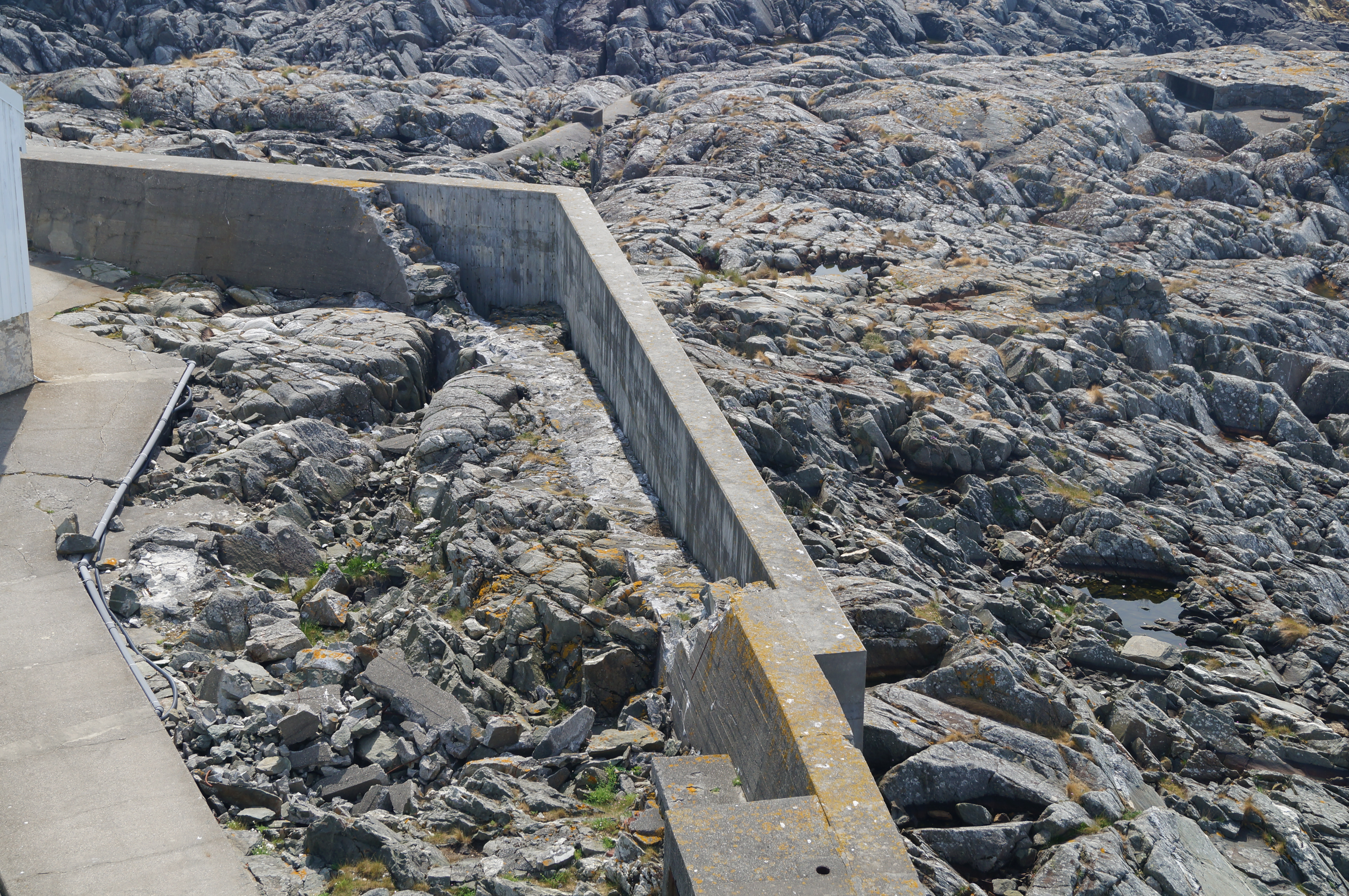 Gammel og ny bølgebryter på Marstein fyrstasjon